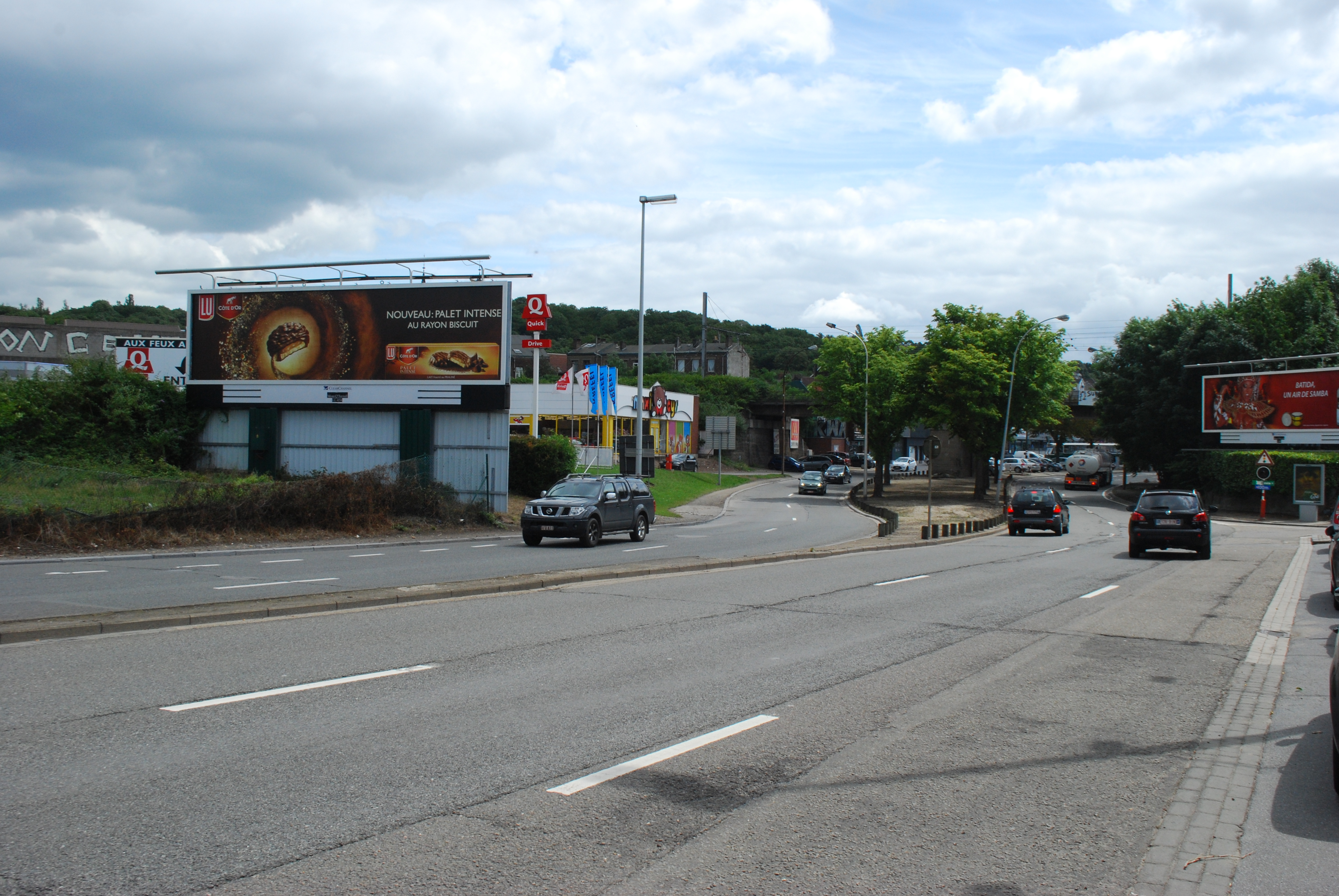 Le boulevard Poincaré à Liège.